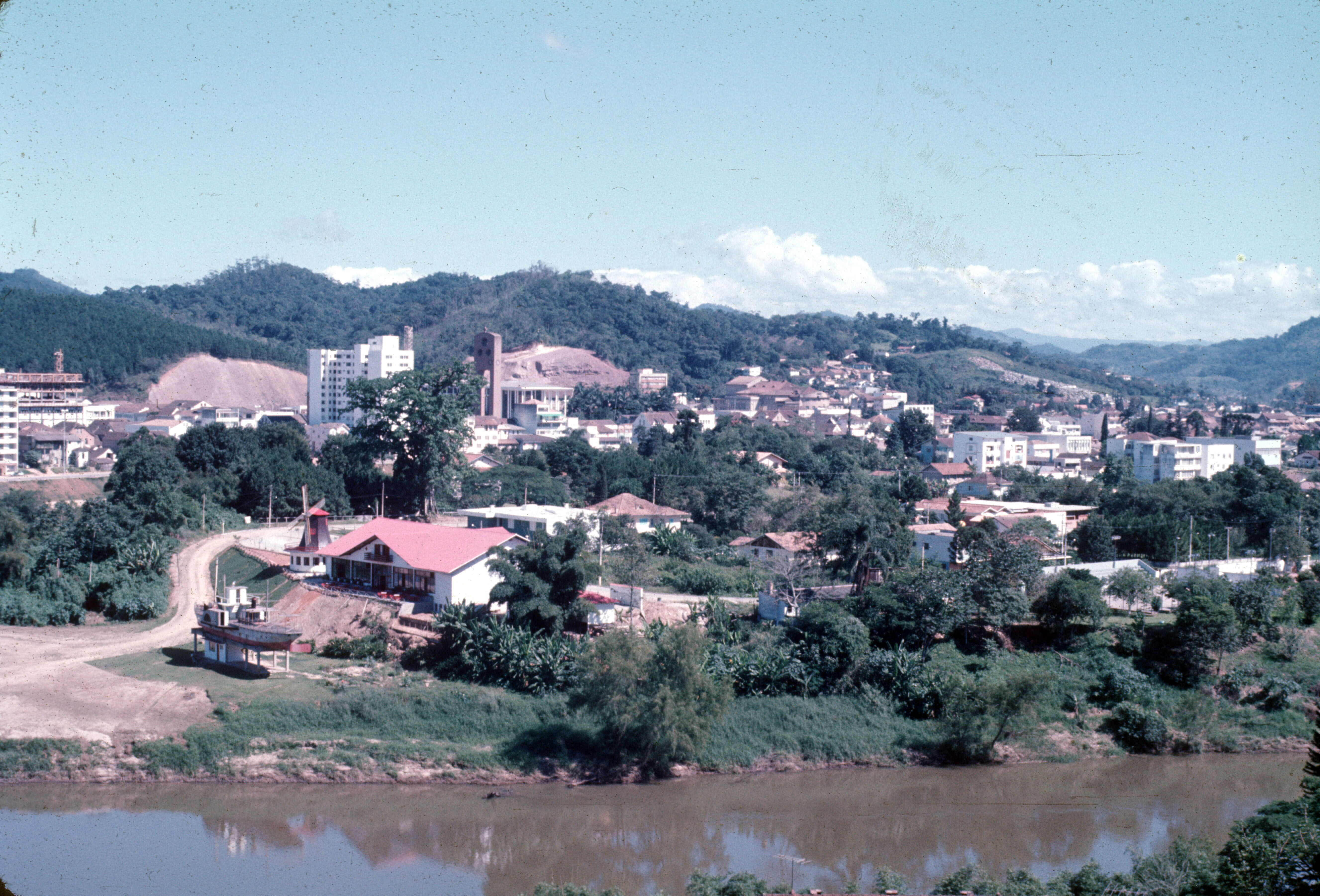 Blumenau em abril de 1972 vendo-se o Vapor Blumenau, o restaurante Moinho do Vale e ao fundo a Catedral com sua torre.